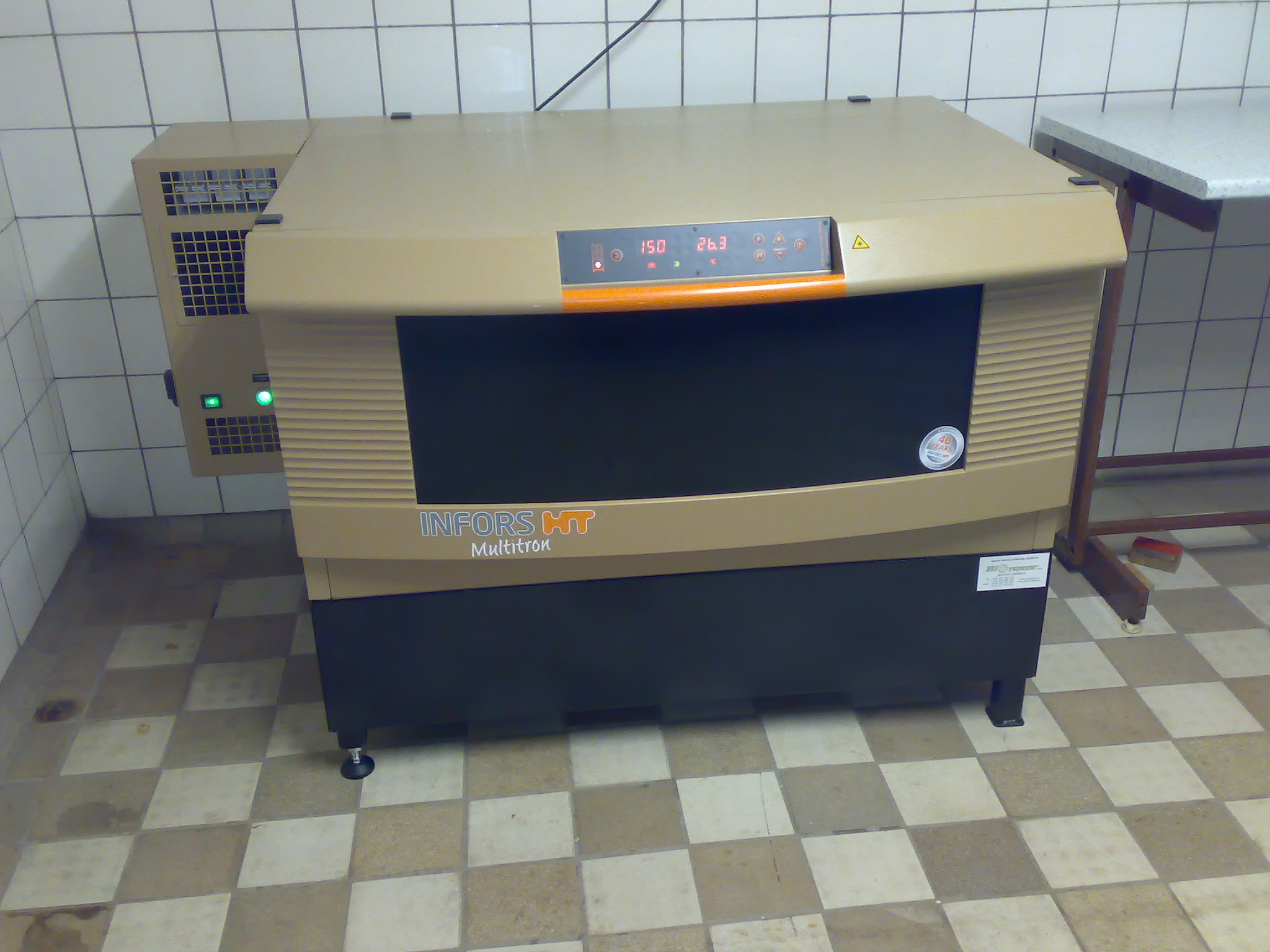 Inkubovana orbitalni trepacka s UV sterilizaci a chlazenim